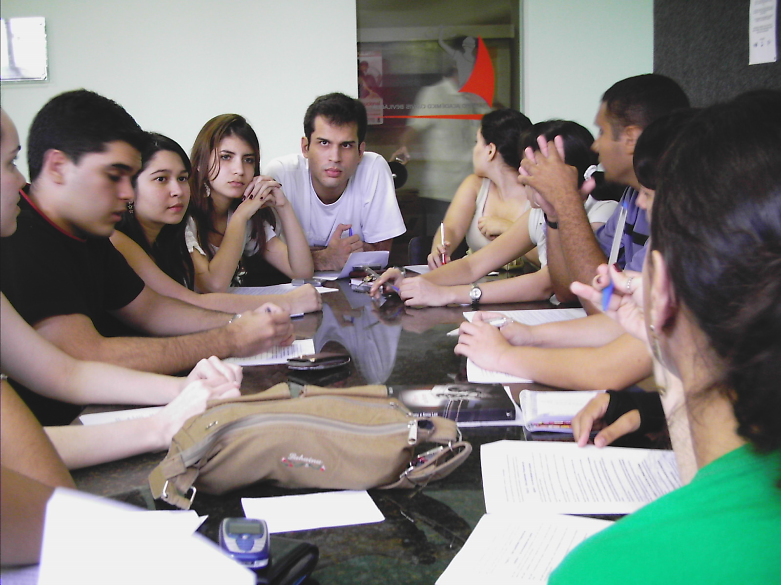 Alunos no Centro Acadêmico Clóvis Beviláqua, depois da reforma.